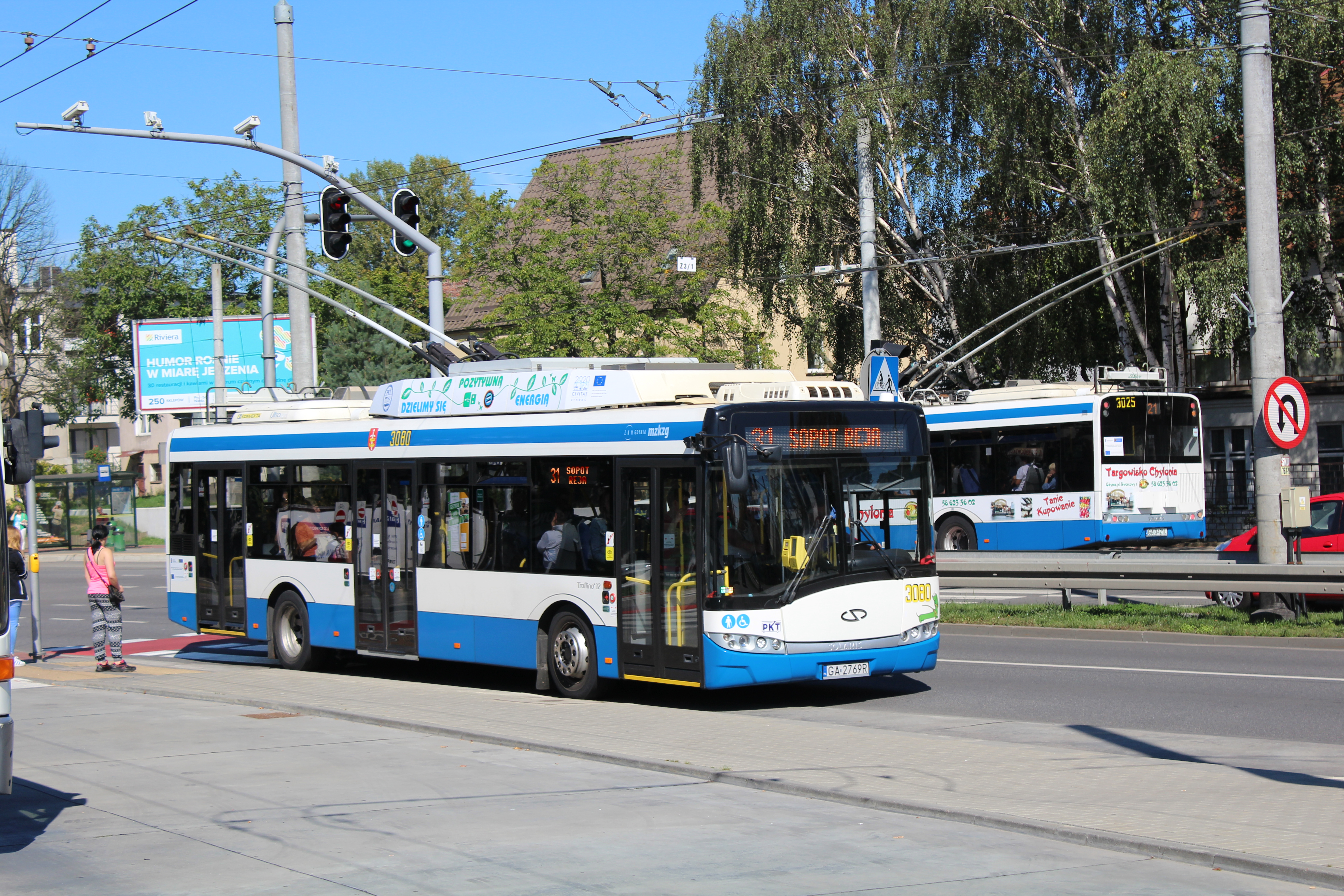 Solaris Trollino 12 w Gdyni, 2016